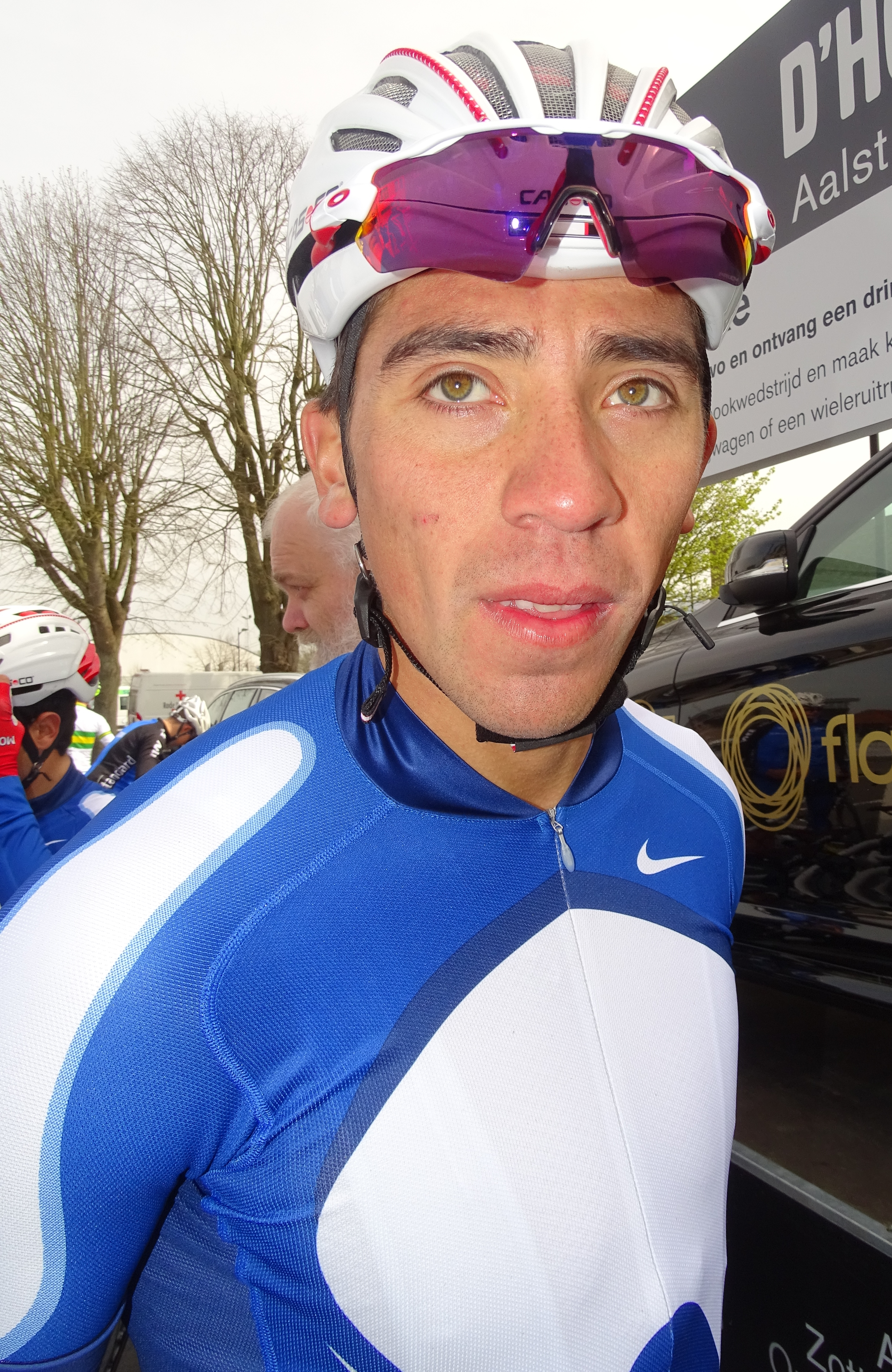 Reportage réalisé le samedi 9 avril à l'occasion du départ et de l'arrivée du Tour des Flandres espoirs 2016 à Audenarde, Belgique.